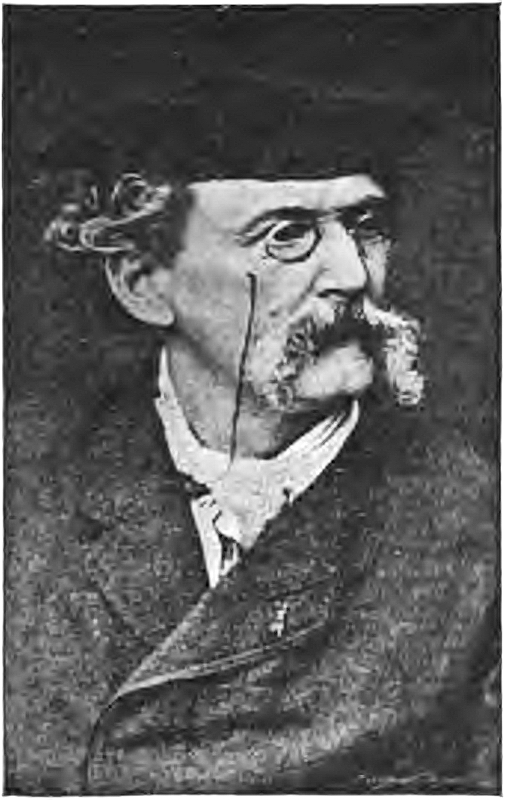 Théodule Ribot (peintre) portrait d'après photographie